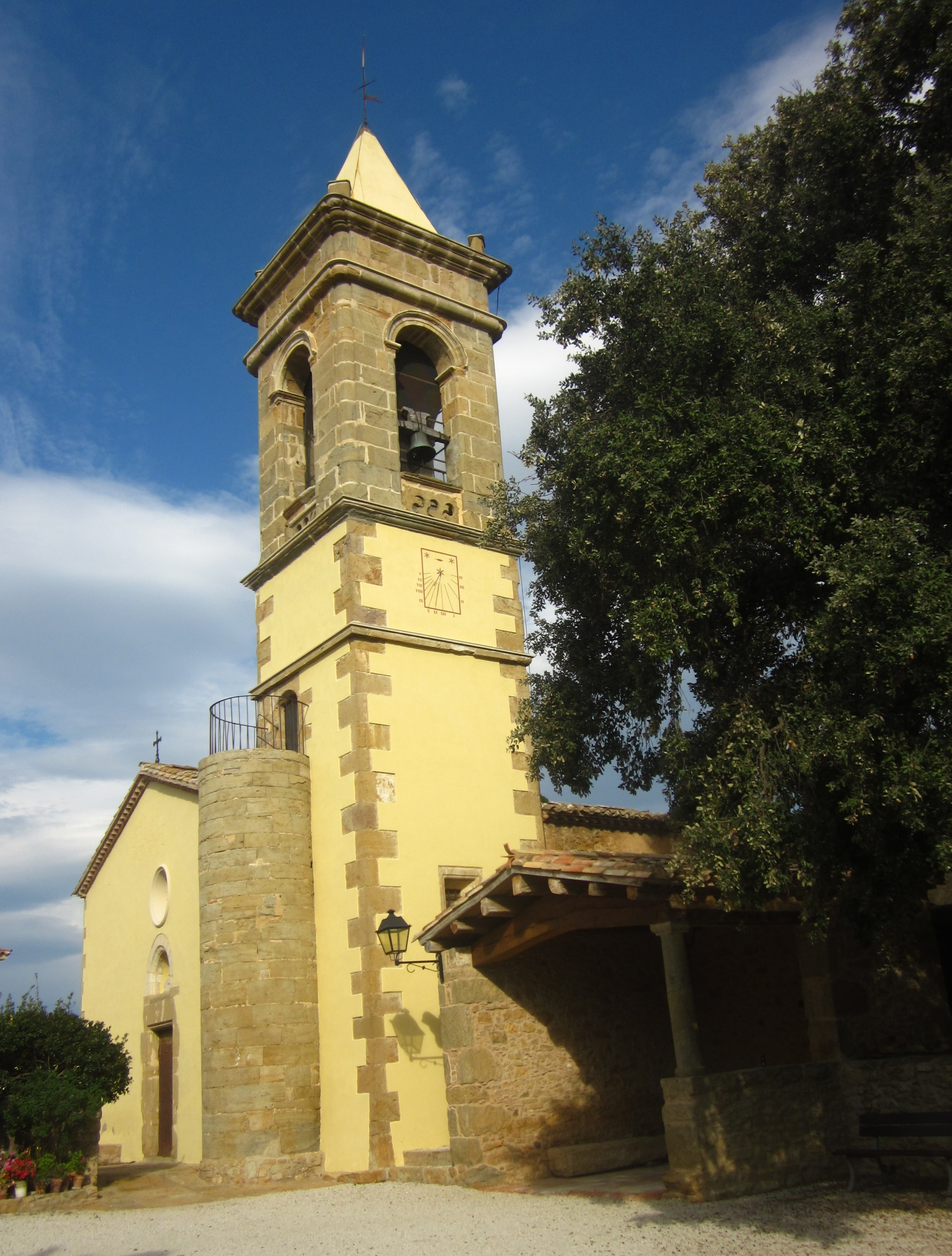 Església de Sant Medir de Cartellà, al municipi de Sant Gregori (Gironès)